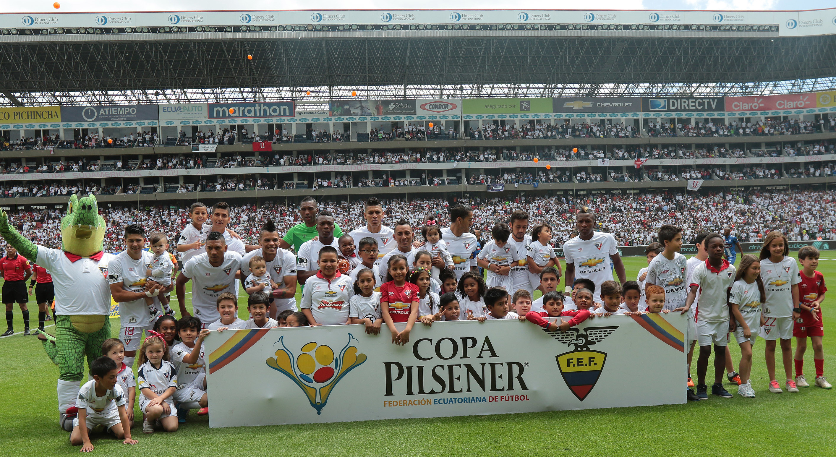 Quito, 19 Dic (Andes).- Emelec consigue el tricampeonato tras empatar cero a cero en el estadio de Casa Blanca. Fotografías: Carlos Rodríguez/Andes.